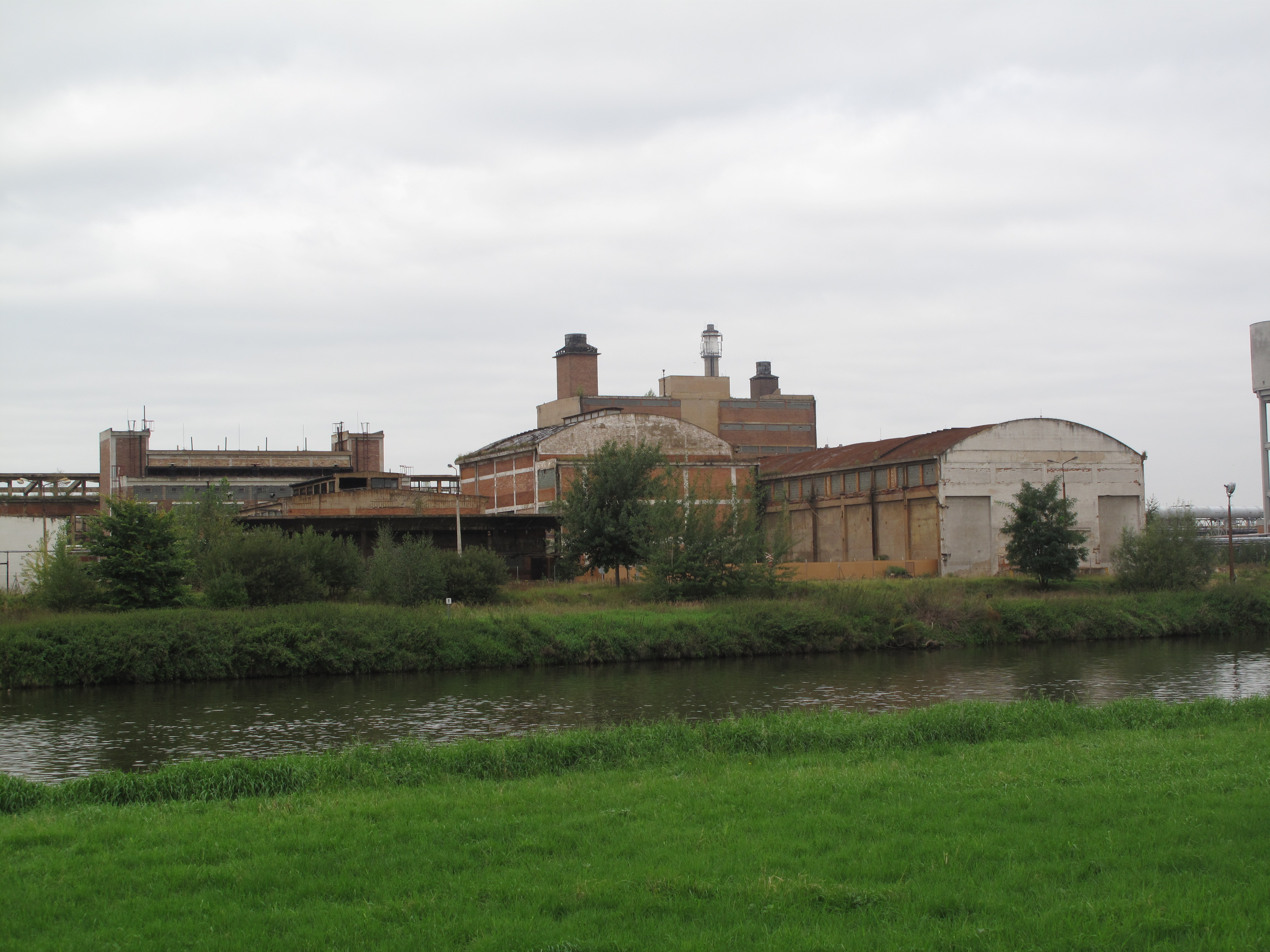 Neratovice